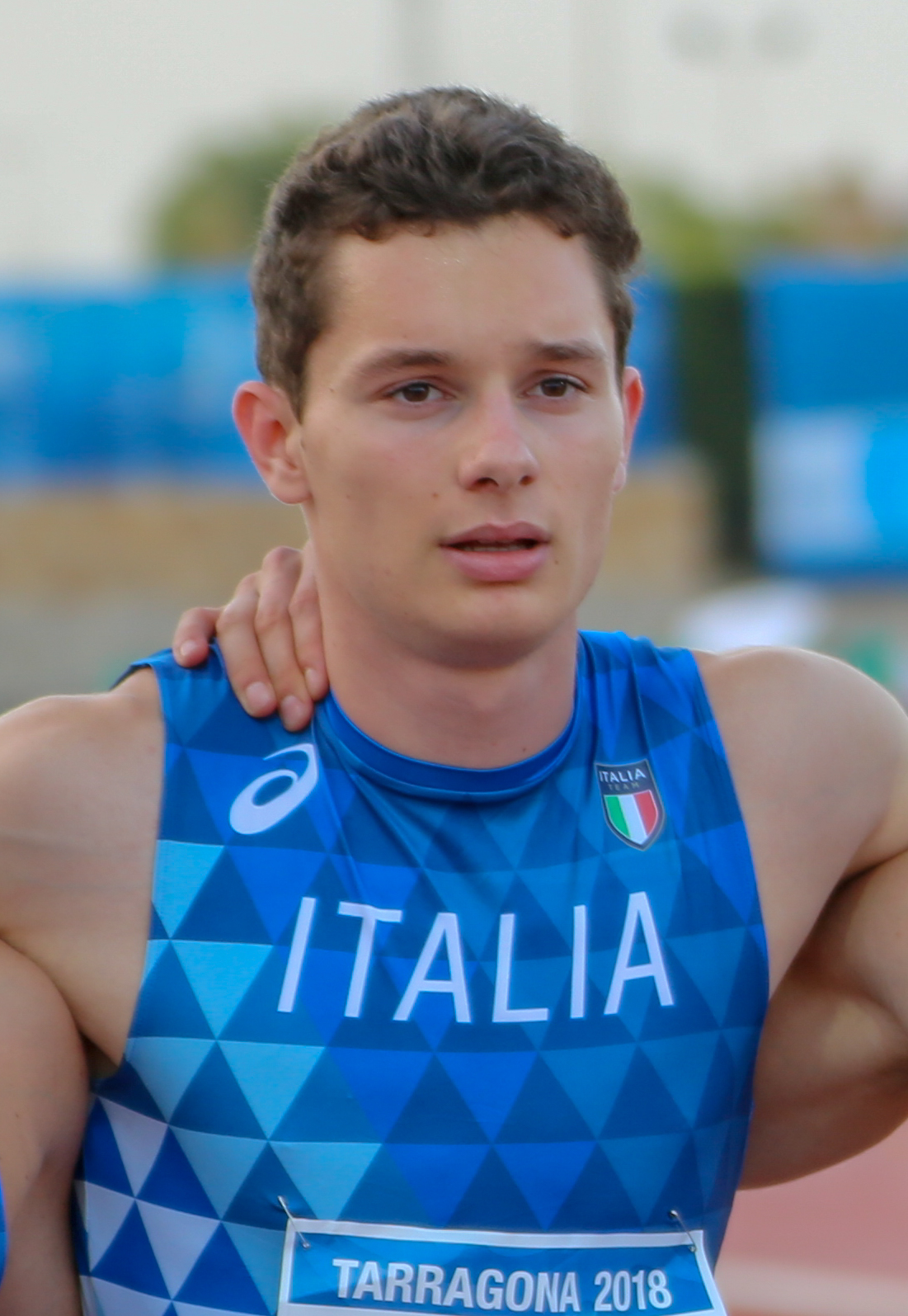 Filippo Tortu en los relevos 4x100 en los Juegos del Mediterráneo 2018)